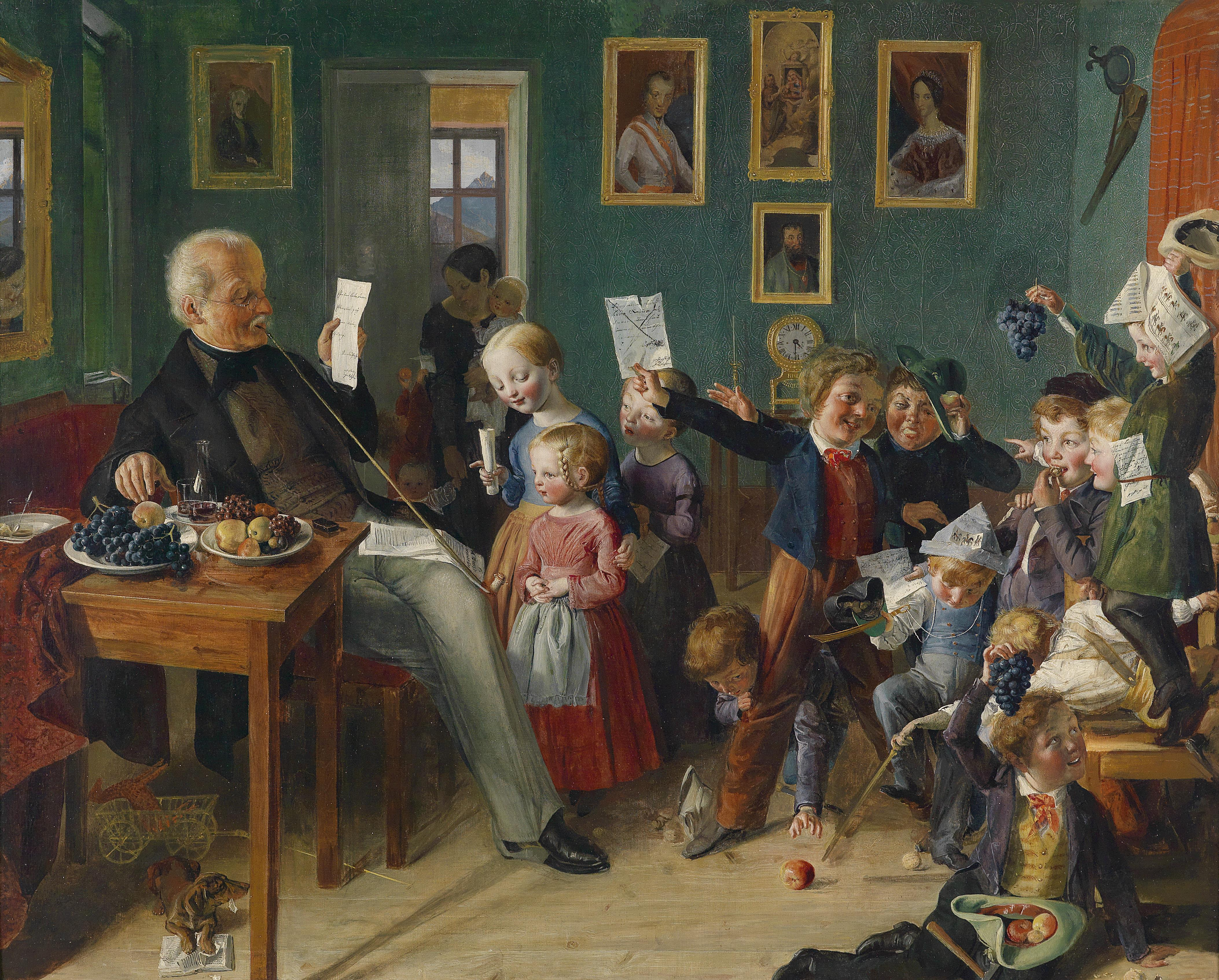 (oder nicht eher: Enkel besuchen den Großvater zum Geburtstag und überreichen Glückwunschbriefe??)